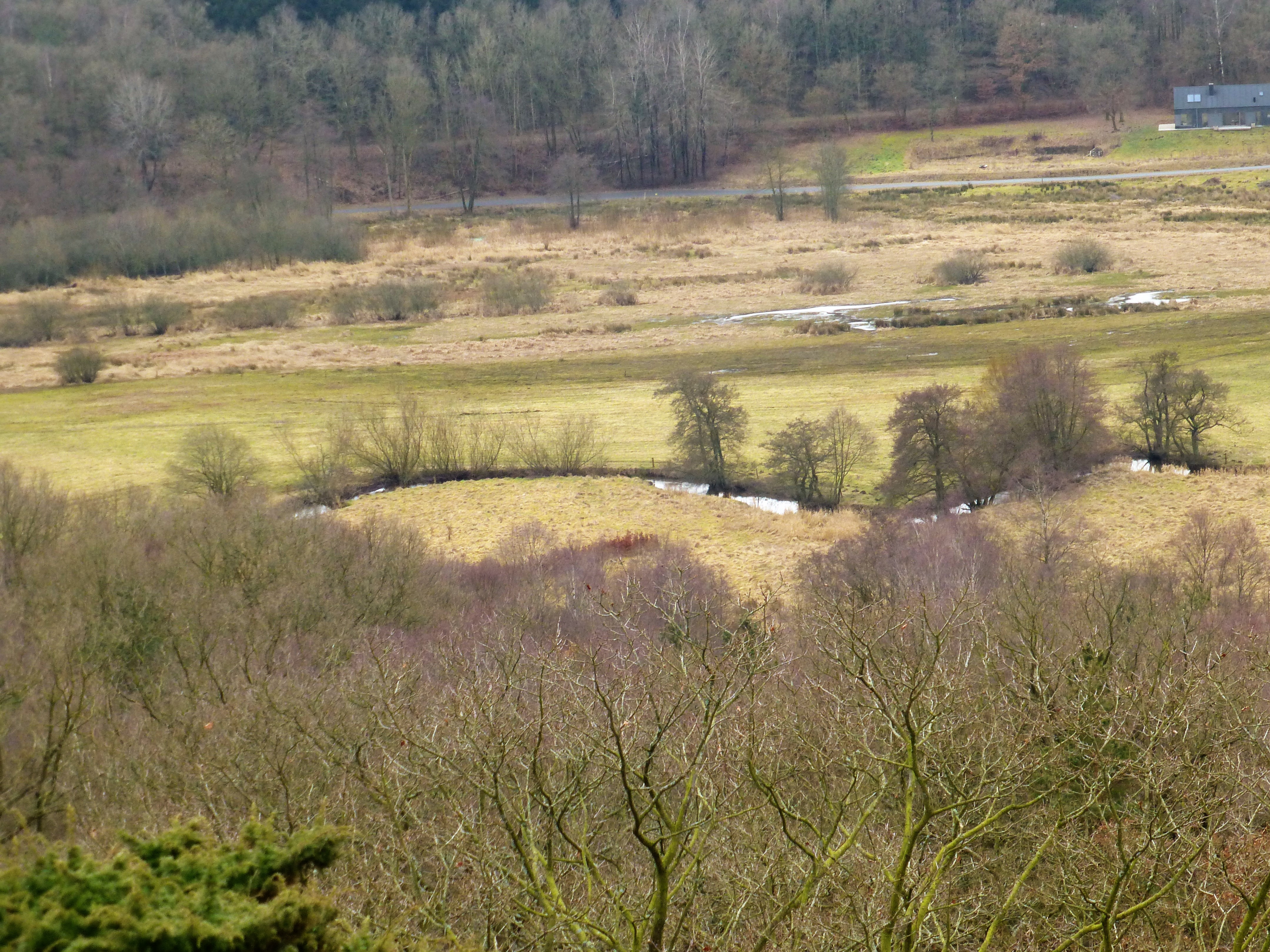 Gjern Å set mod sydvest, fra Store Troldhøj